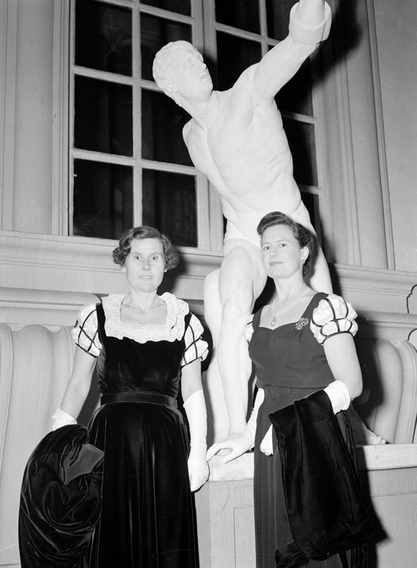 två kvinnor i hovdräkt på Kungliga slottet, troligen arkadgången i östra längan.